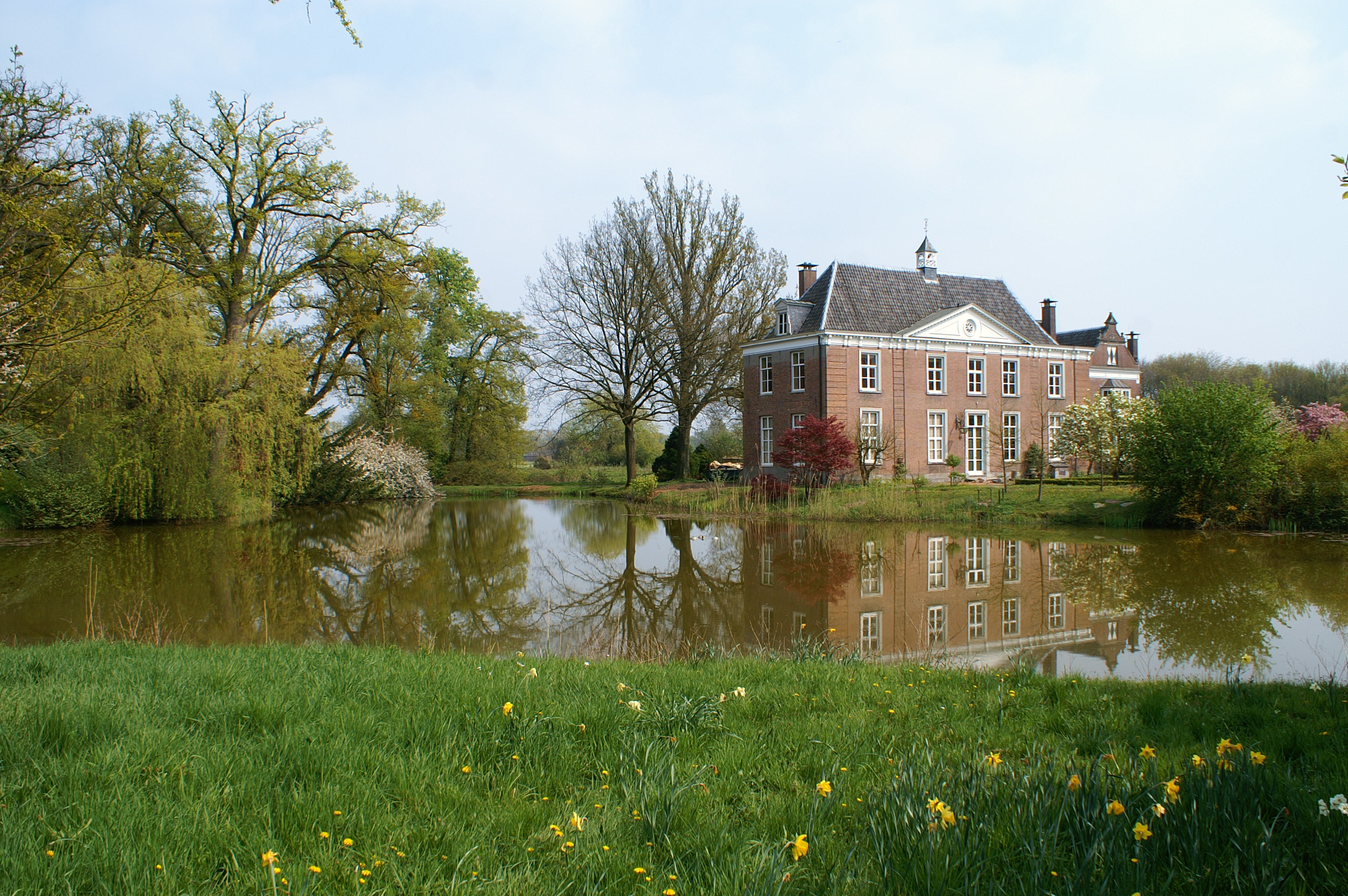 Het voormalige kasteel Zegenwerp te St.-Michielsgestel.